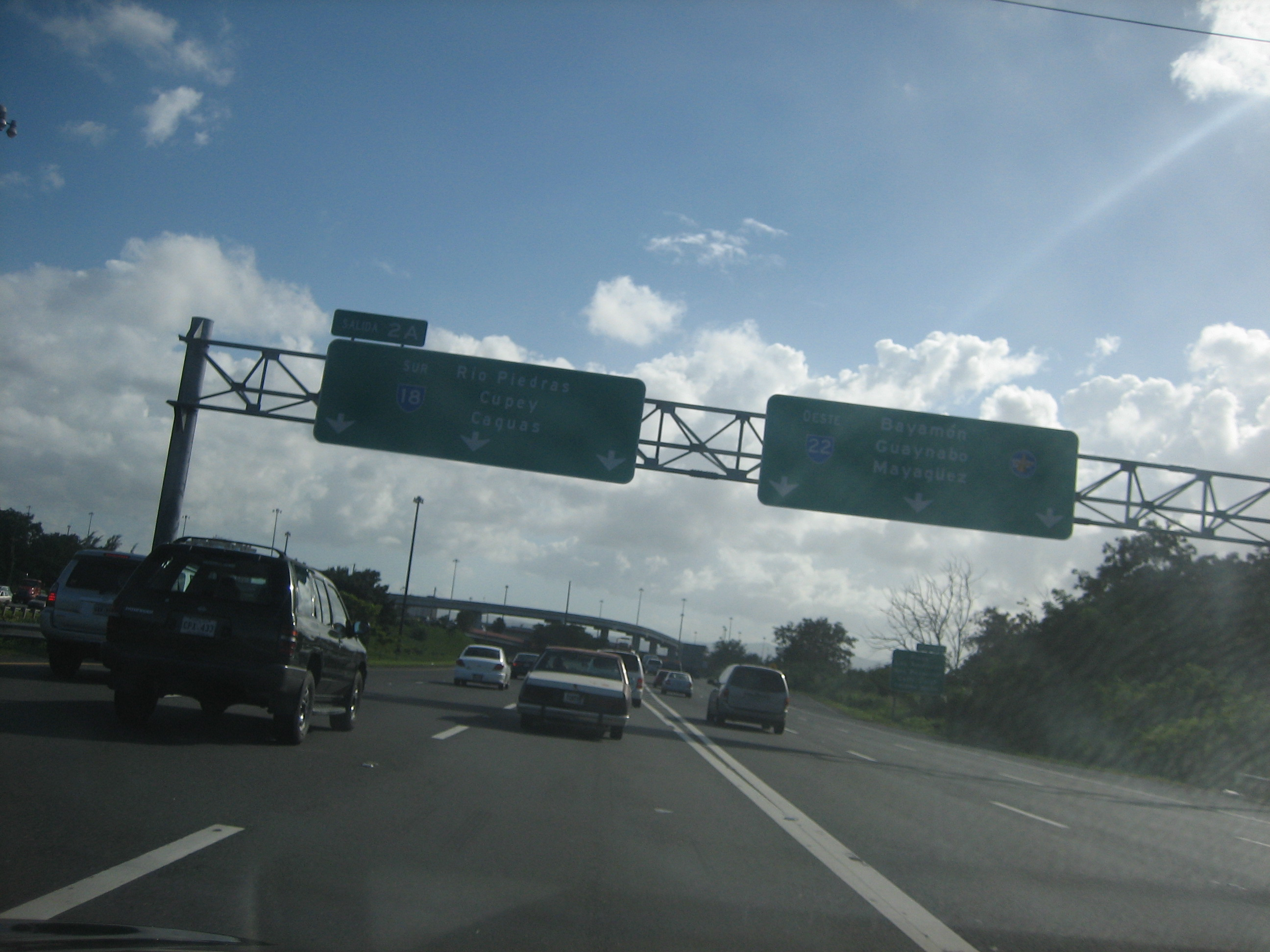 Carretera 22